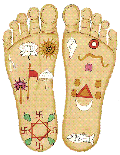 Budda jalajäljed